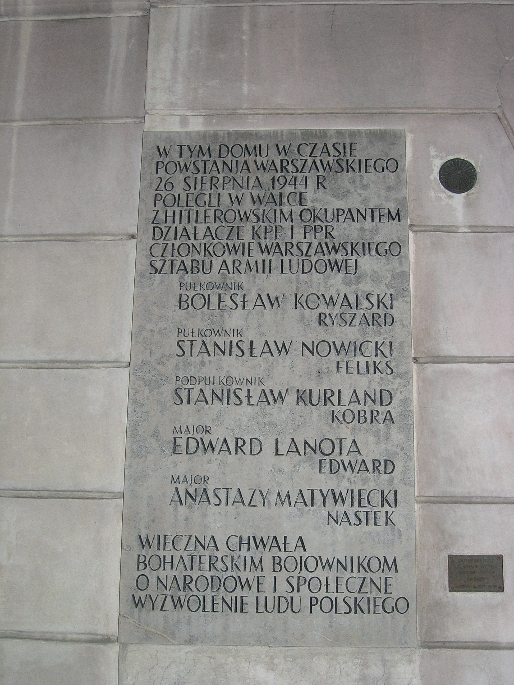 Tablica upamiętniająca członków sztabu Armii Ludowej: dowódcę Okręgu mjr Bolesława Kowalskiego ps. „Ryszard", członka Sztabu Głównego AL mjr Stanisława Nowickiego ps. „Feliks", szefa Sztabu Okręgu kpt. Edwarda Lanote ps. „Edward", dowódcę oddziałów Służby Bezpieczeństwa AL w powstaniu kpt. Stanisława Kurlanda ps. „Korab" i oficera sztabowego por. Anastazego Matywieckiego ps. „Nastek" poległych w powstaniu warszawskim na kamienicy przy ul. Freta 16 w Warszawie